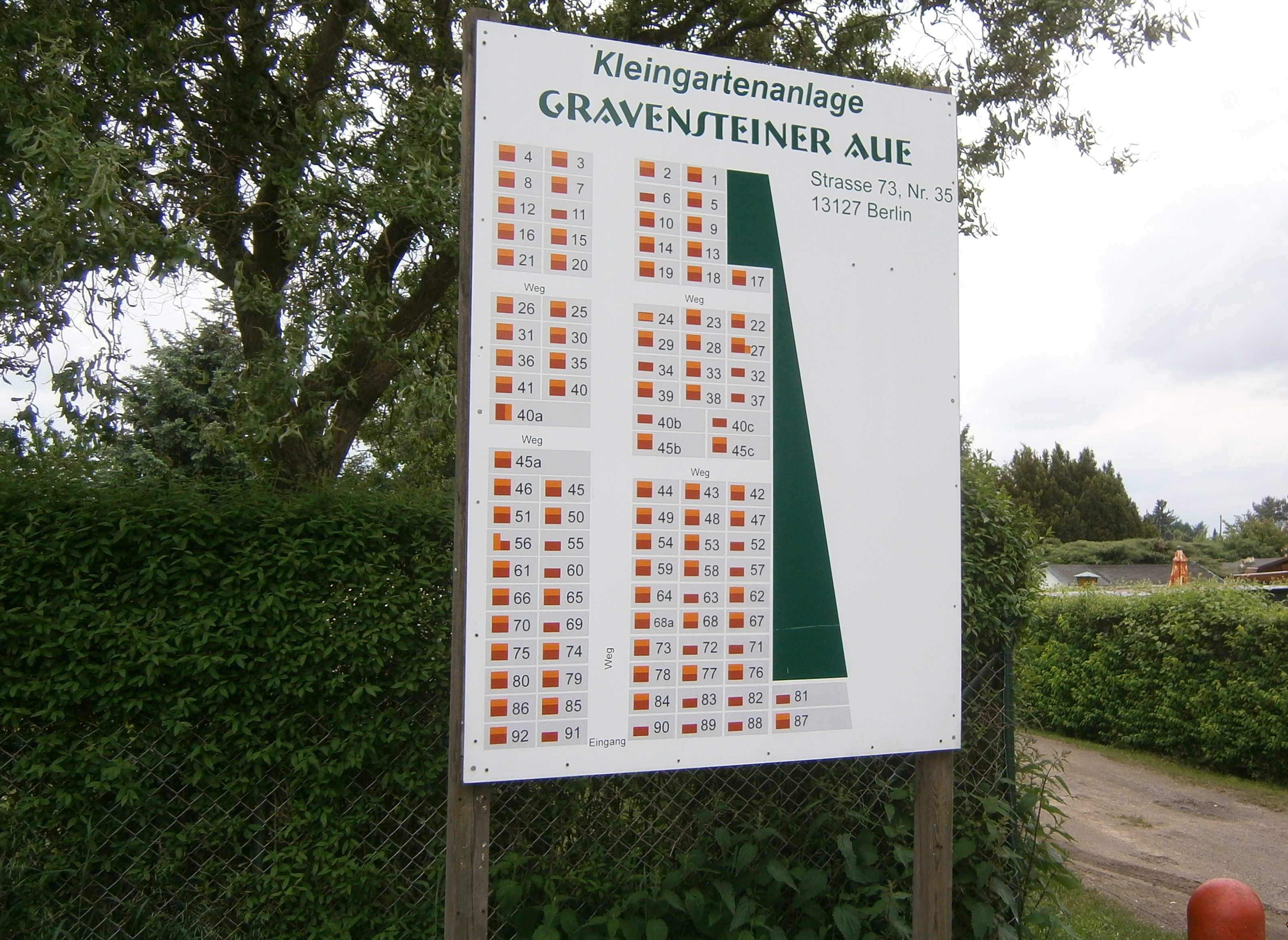 Die Kleingartenanlage Gravensteiner Aue ist eine postalische Anschrift im Ortsteil Berlin-Französisch Buchholz (hier KGA-Tafel: KGA Gravensteine Aue)